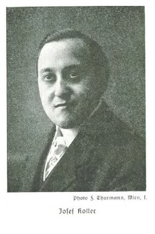 Josef Koller (1872-1945)Depicted person: Josef Koller – Austrian author